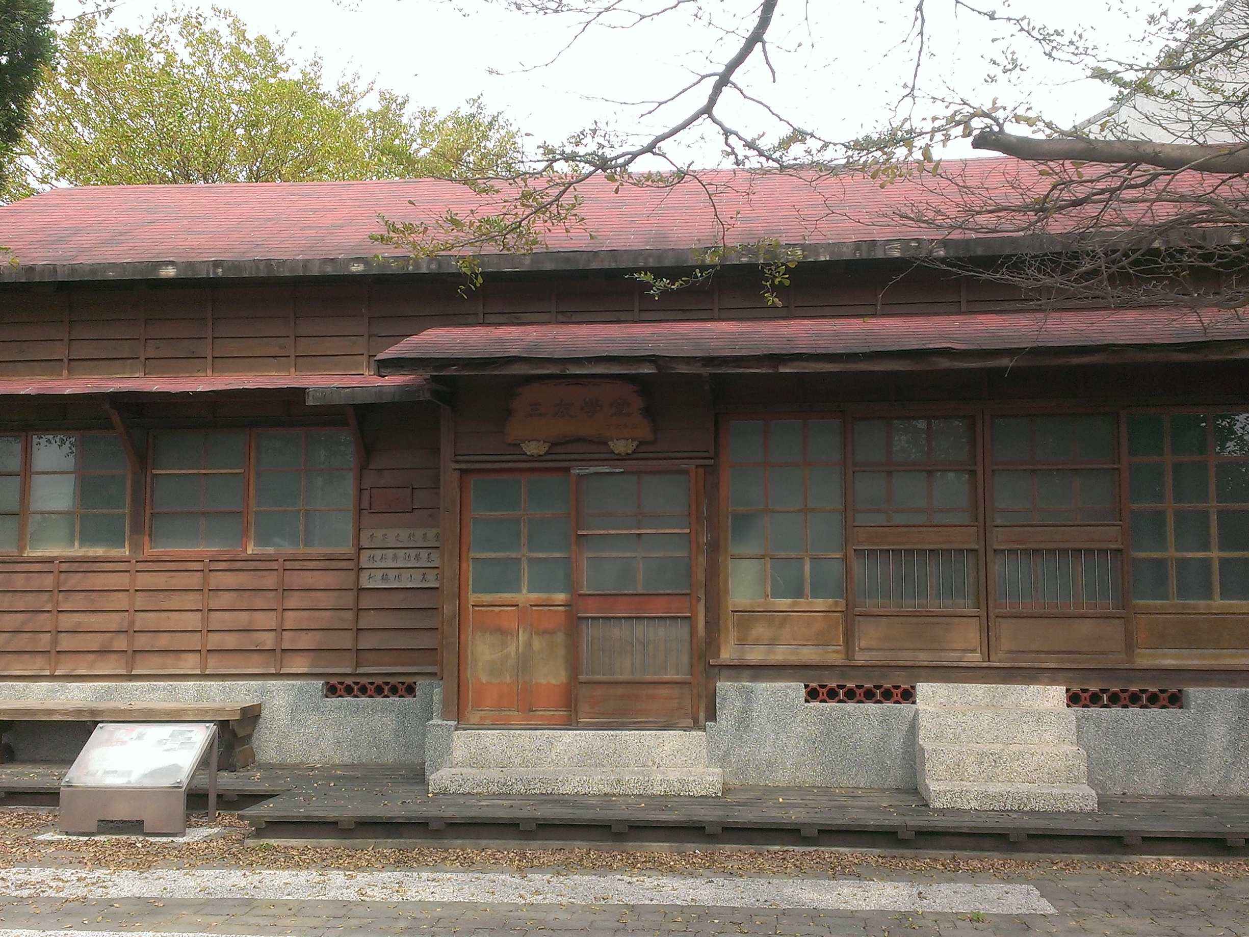 嘉義縣歷史建築，位於朴子市松梅國小